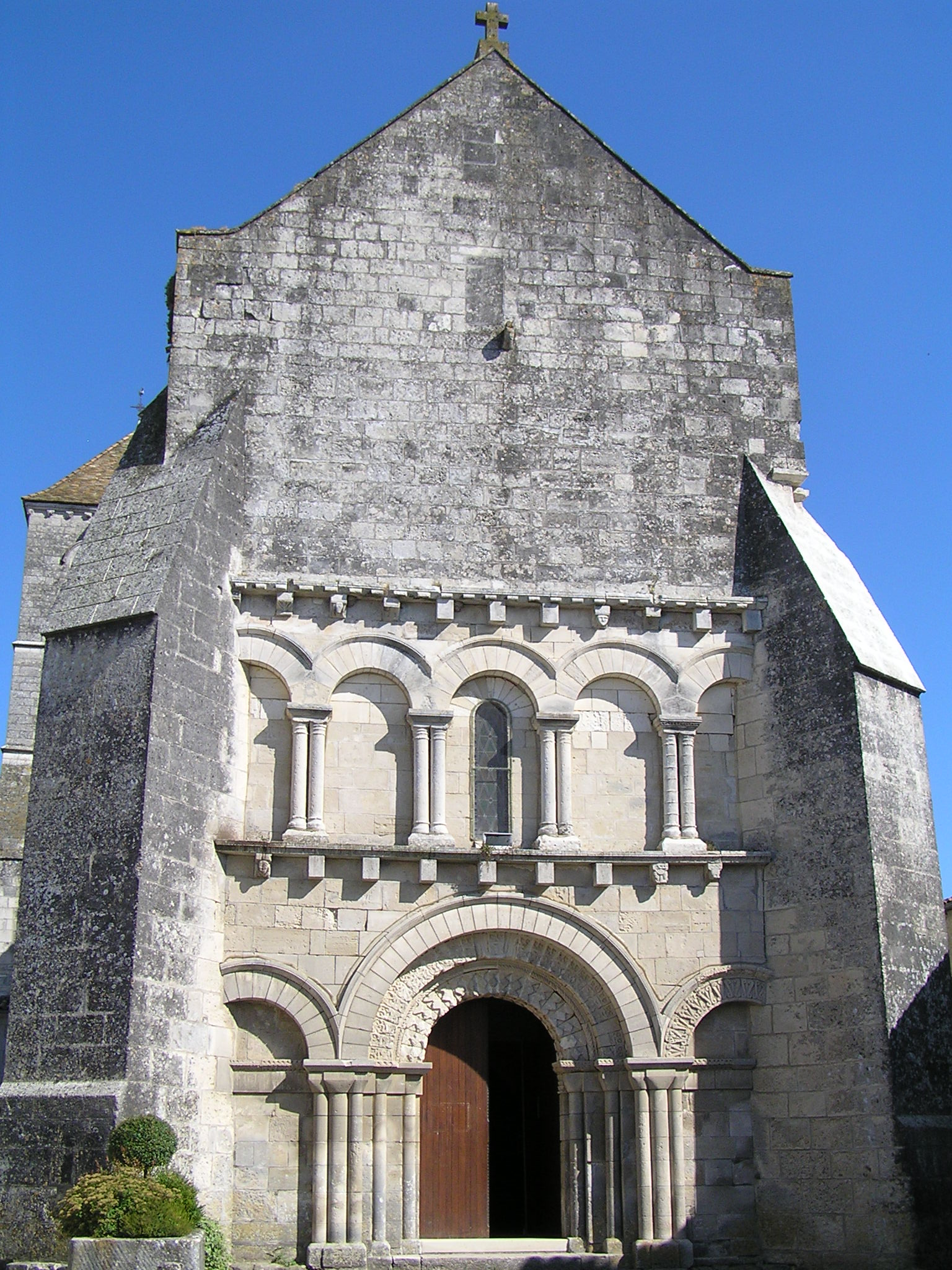 église de Mérignac, Charente, France